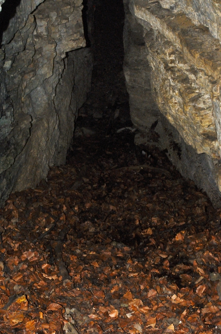 Wanfried auf der Plesse "Im inneren eines Taterlochs"